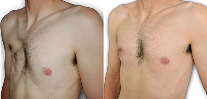 Poland Syndrom mit 3D Custom Implantat behandelt